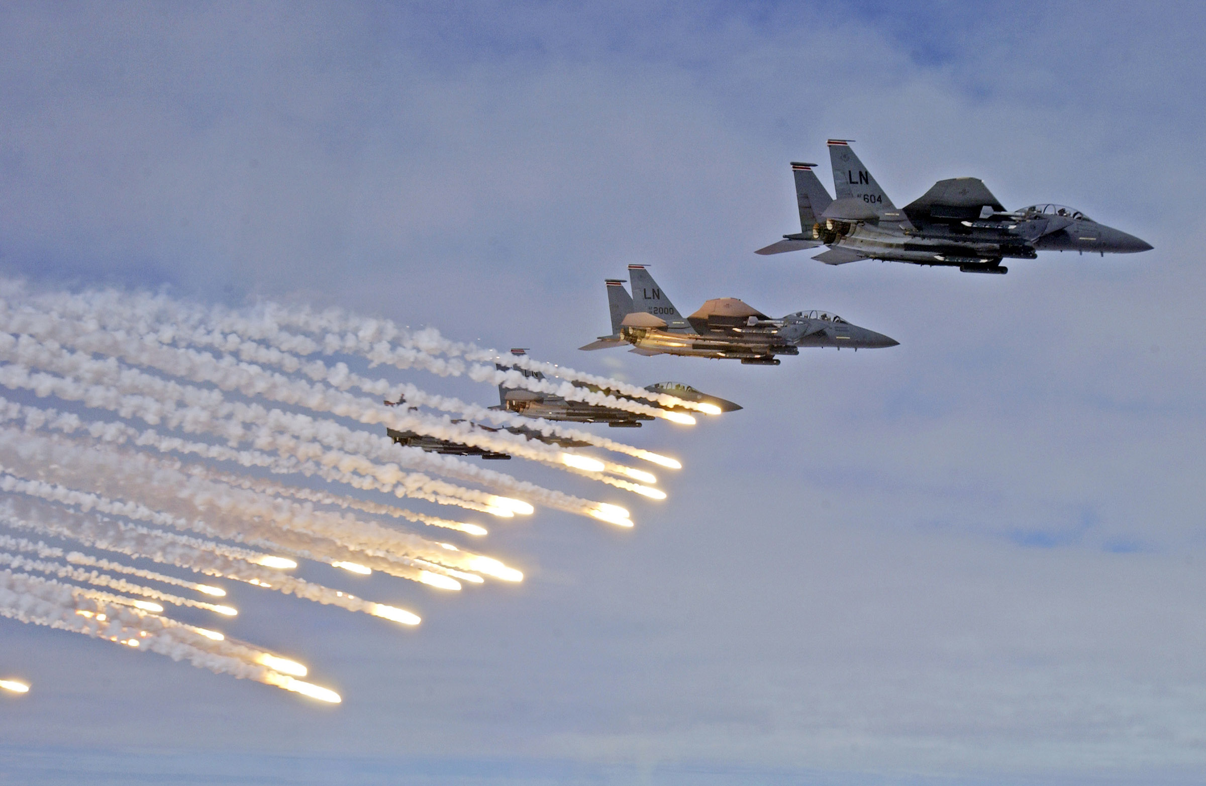 McDonnell Douglas F-15E Strike Eagles sganciano chaff e flare mentre si dirigono verso il poligono della RAF di Holbeach nel corso della competizione militare Excalibur dell' agosto del 2006